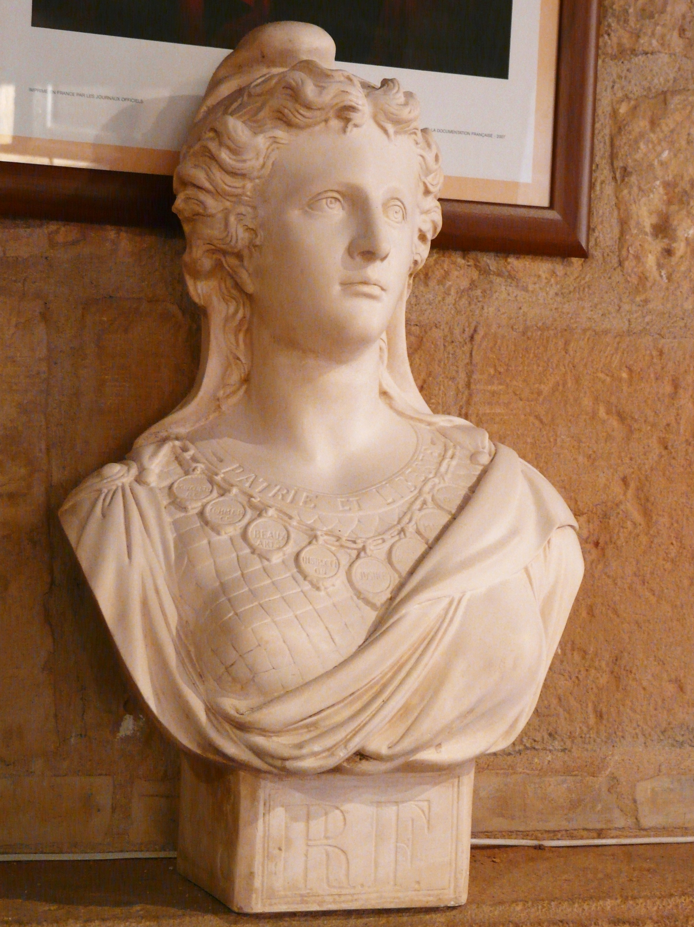 Buste de Marianne, Dordogne, France